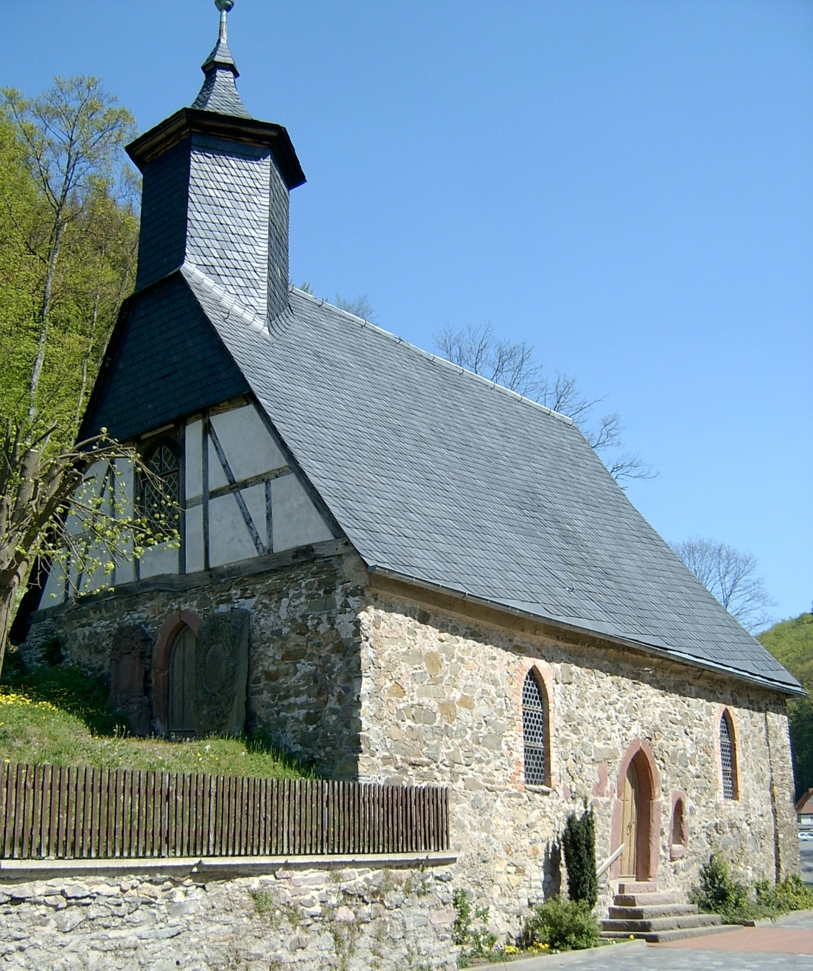 Stolberg (Harz)